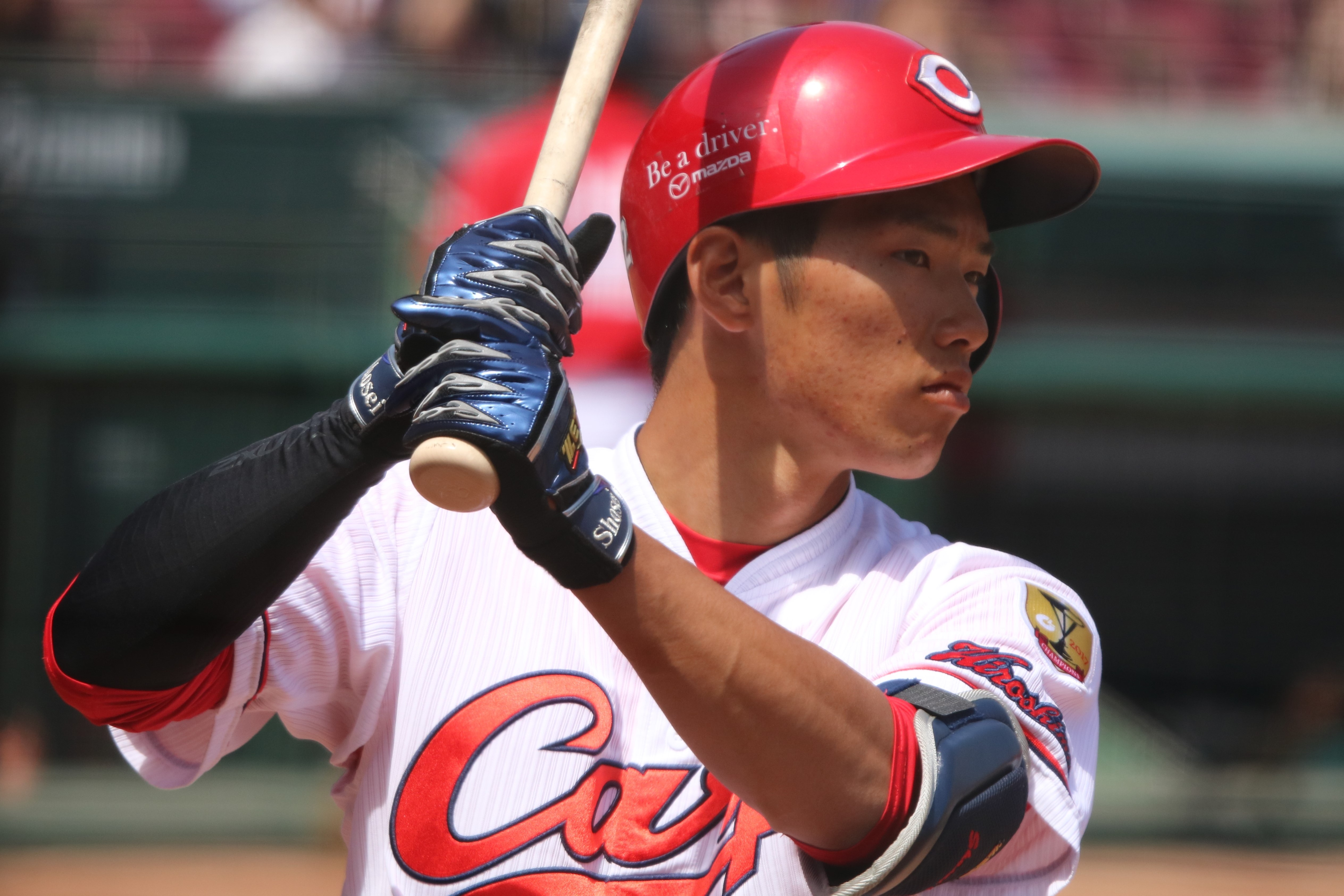 2018/4/13 マツダスタジアム